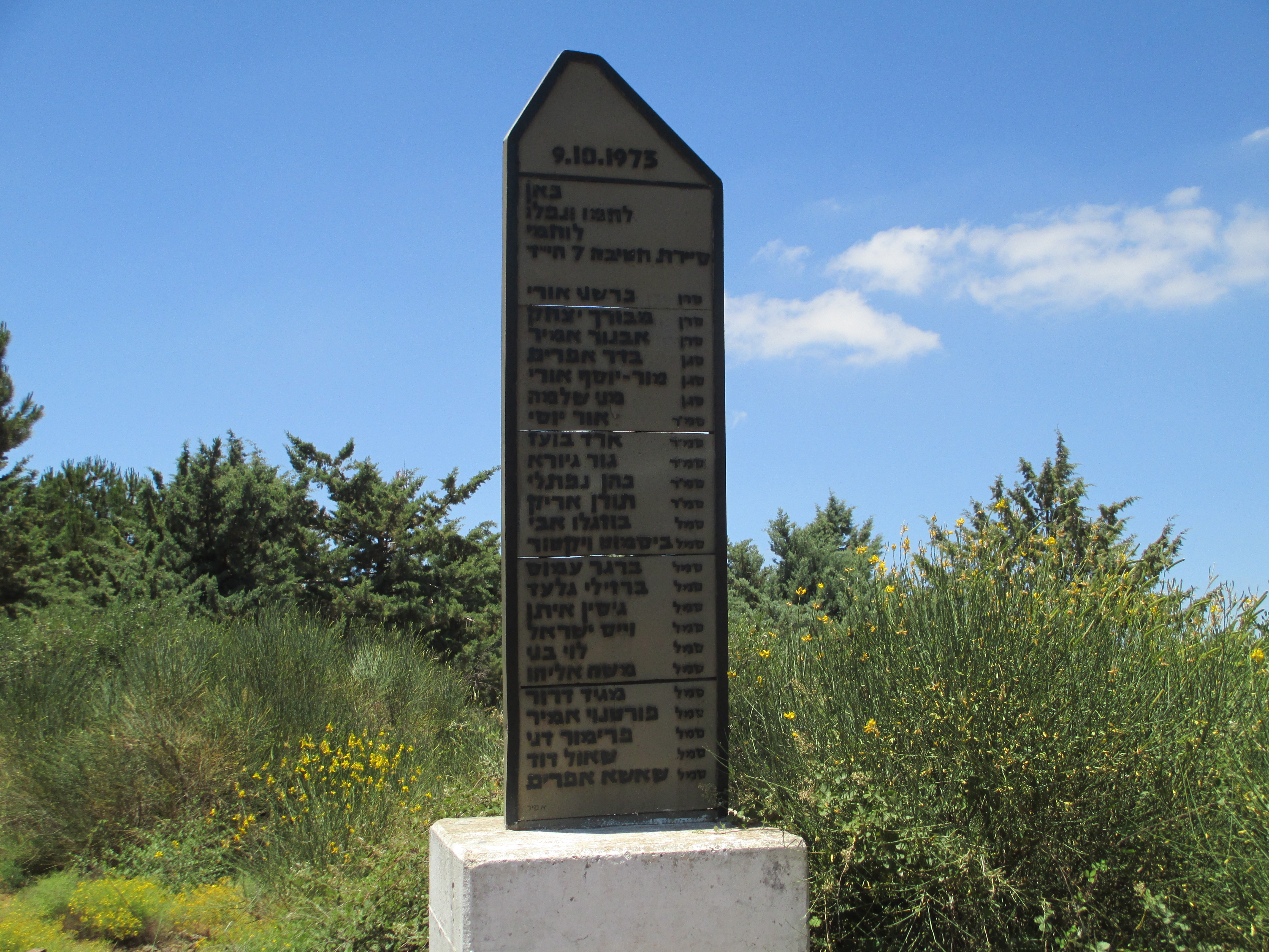 אנדרטת פלס"ר 7 ברמת הגולן